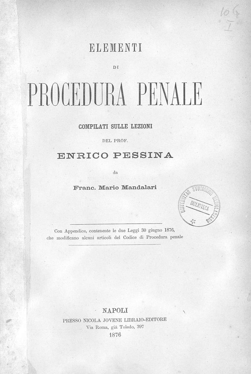 Frontespizio